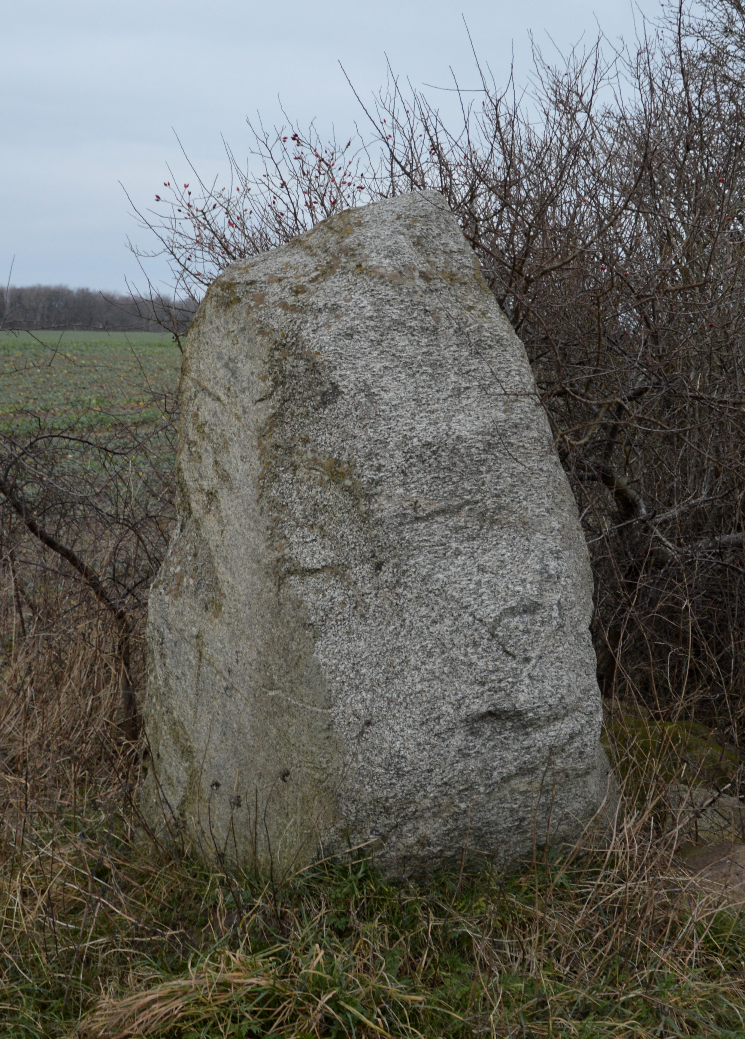 Sagenstein bei Serams